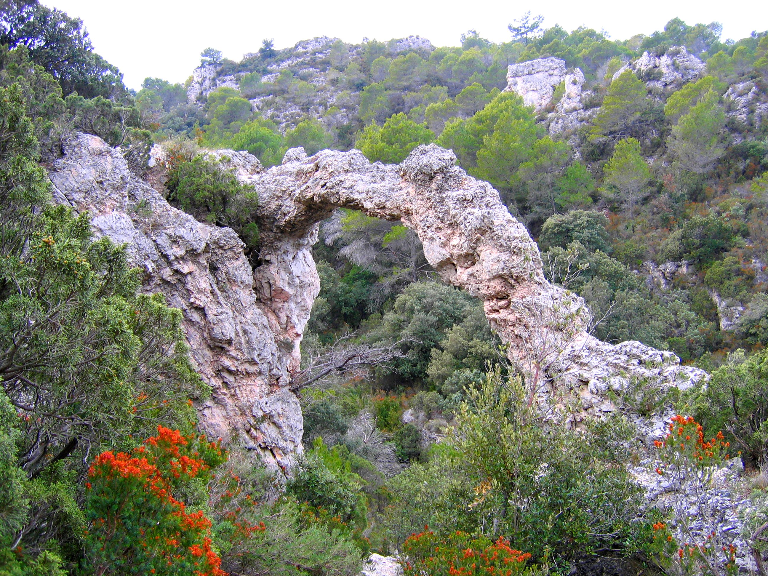 Description: Arche dans un paysage dolomitique. L'Anse du Cirque de Mourèze. Hérault, France. Source: Hugo Soria Licence: GFDL Hugo Soria